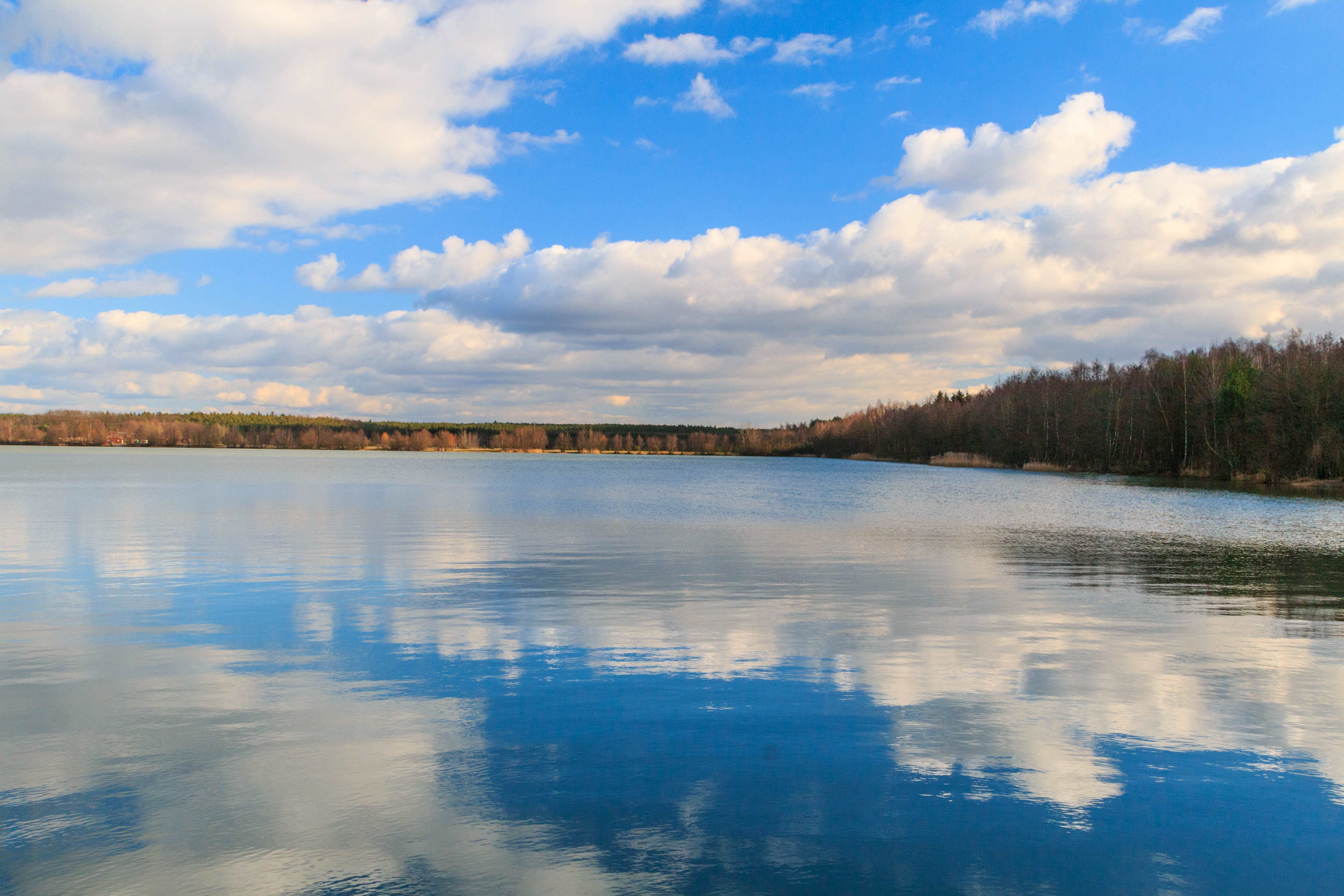 Větší jezero (písník) u obce Štít